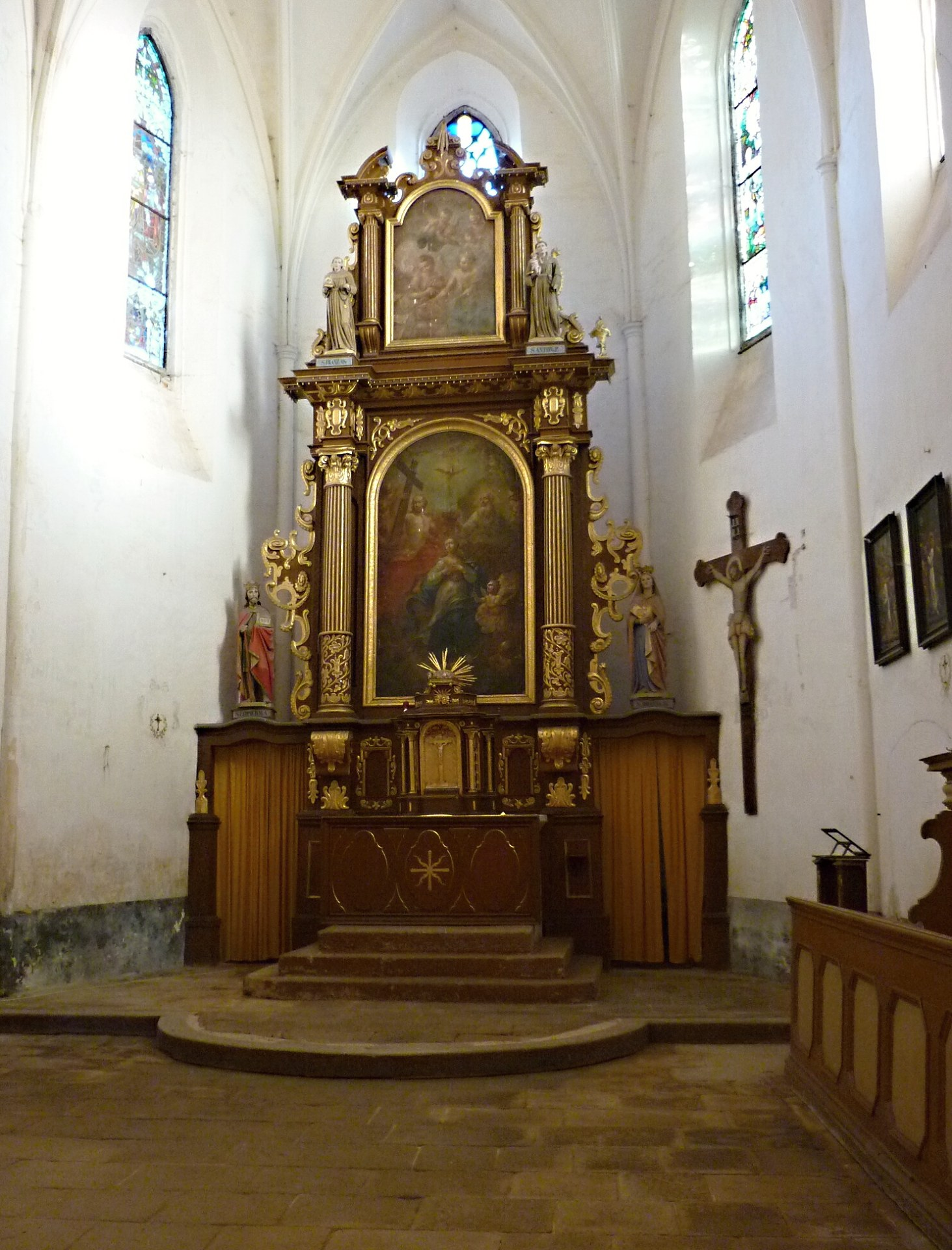 Kostel Božího těla ve Slavonicích - oltář